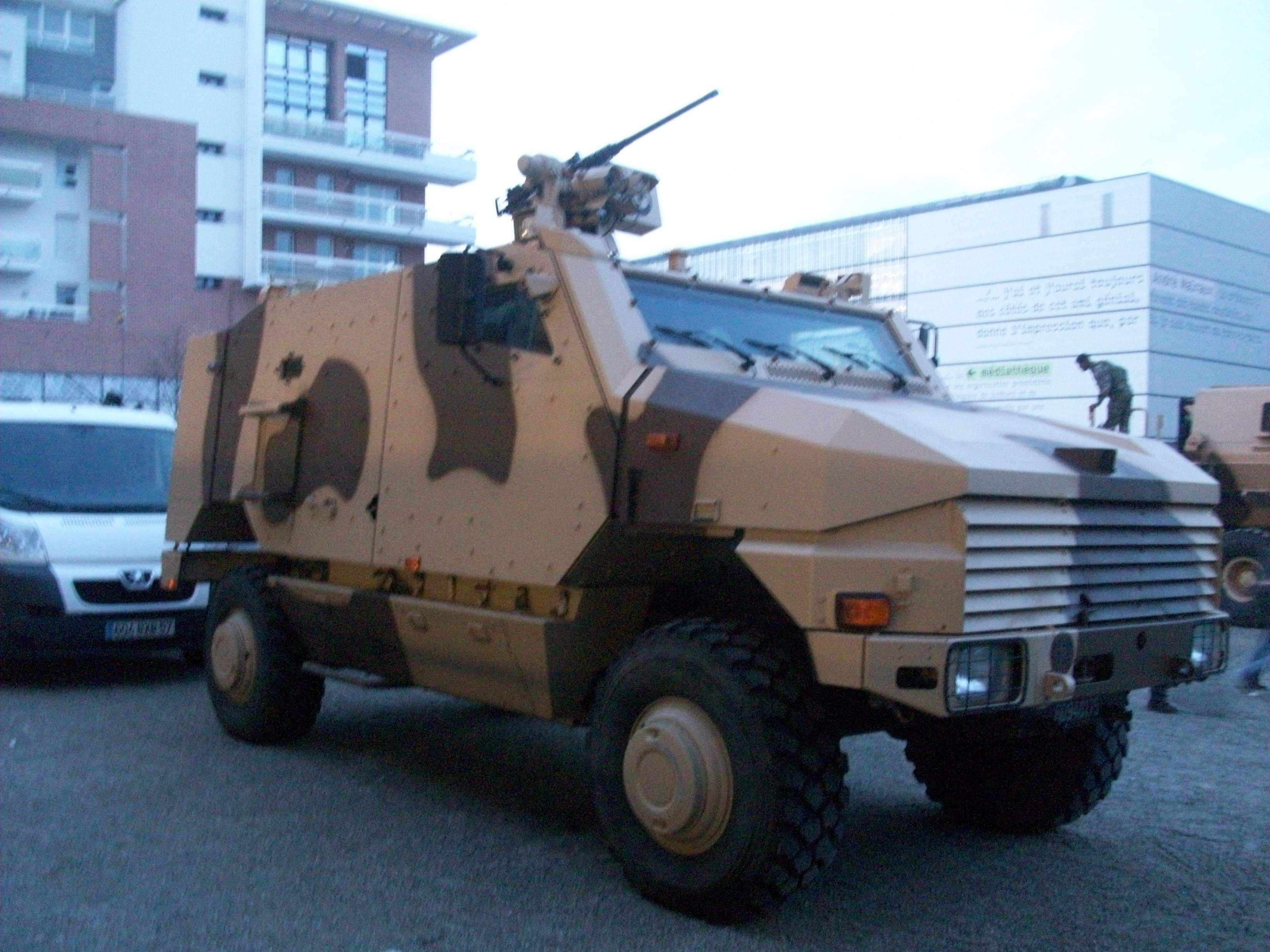 Présentation de véhicules de l'armée française devant Rivétoile, Strasbourg